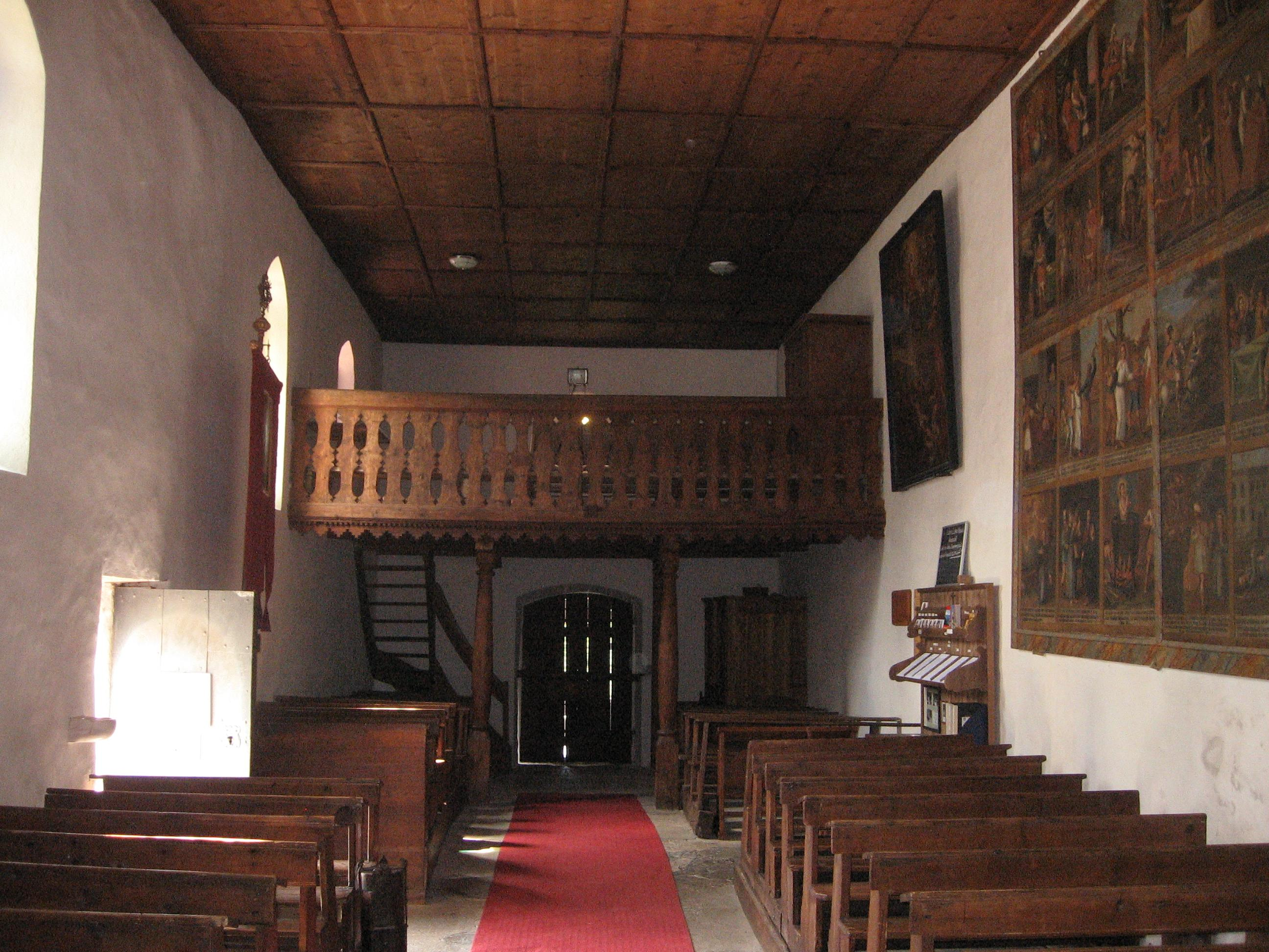 Inside Saint George church on Danielsberg.